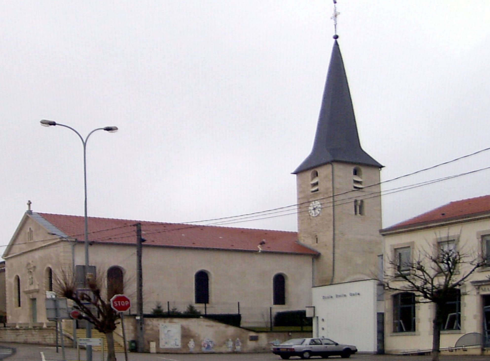 L'église de la Nativité-de-la-Vierge à Maizières